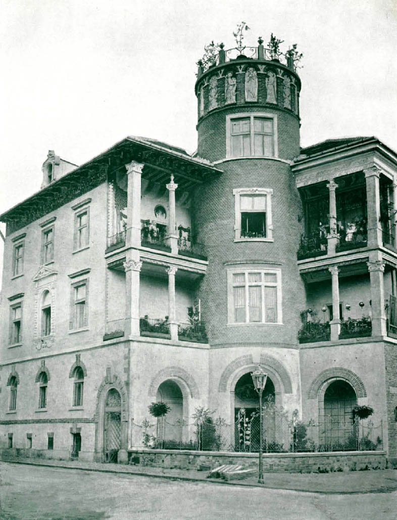 Власний будинок архітектора Владислава Екельського (1855—1927).